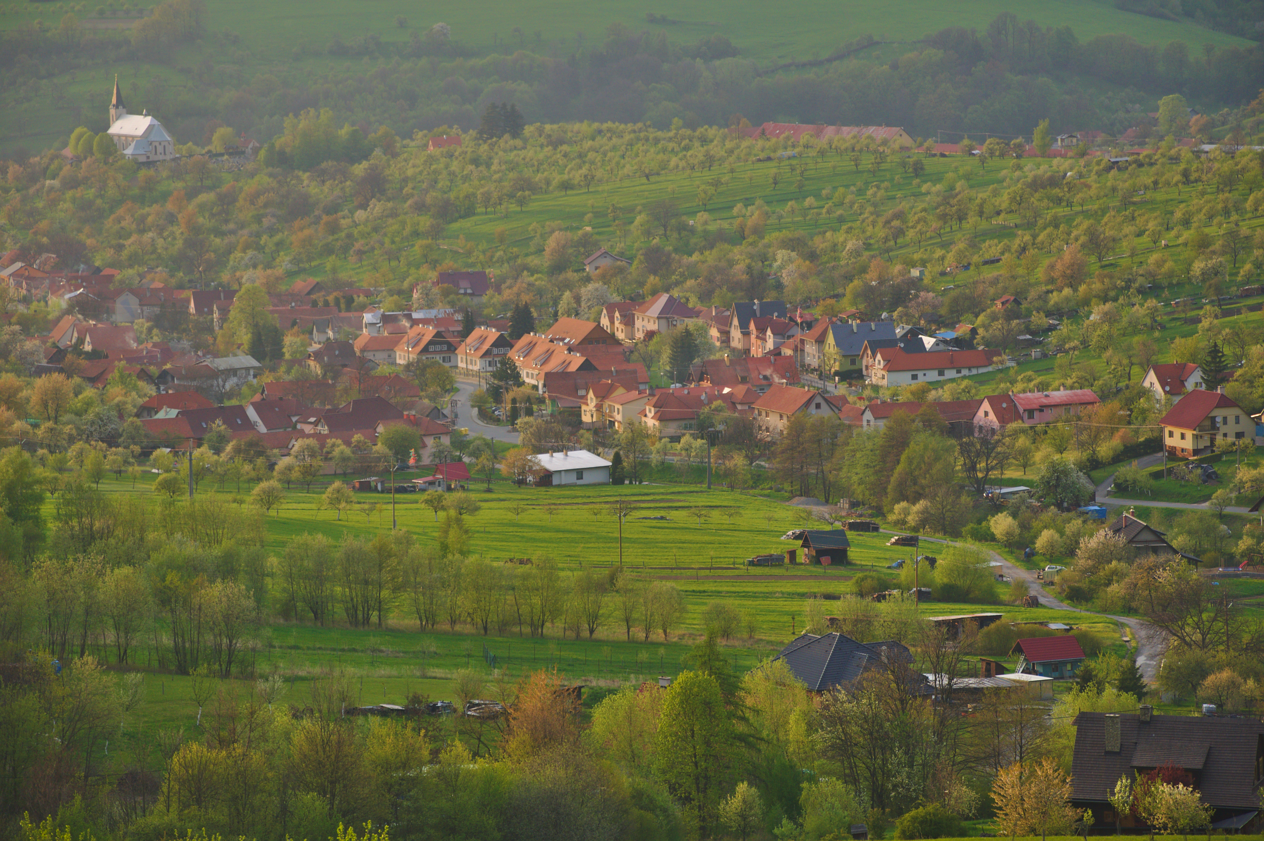 Pohled na obec při západu slunce, Nedašov, okres Zlín